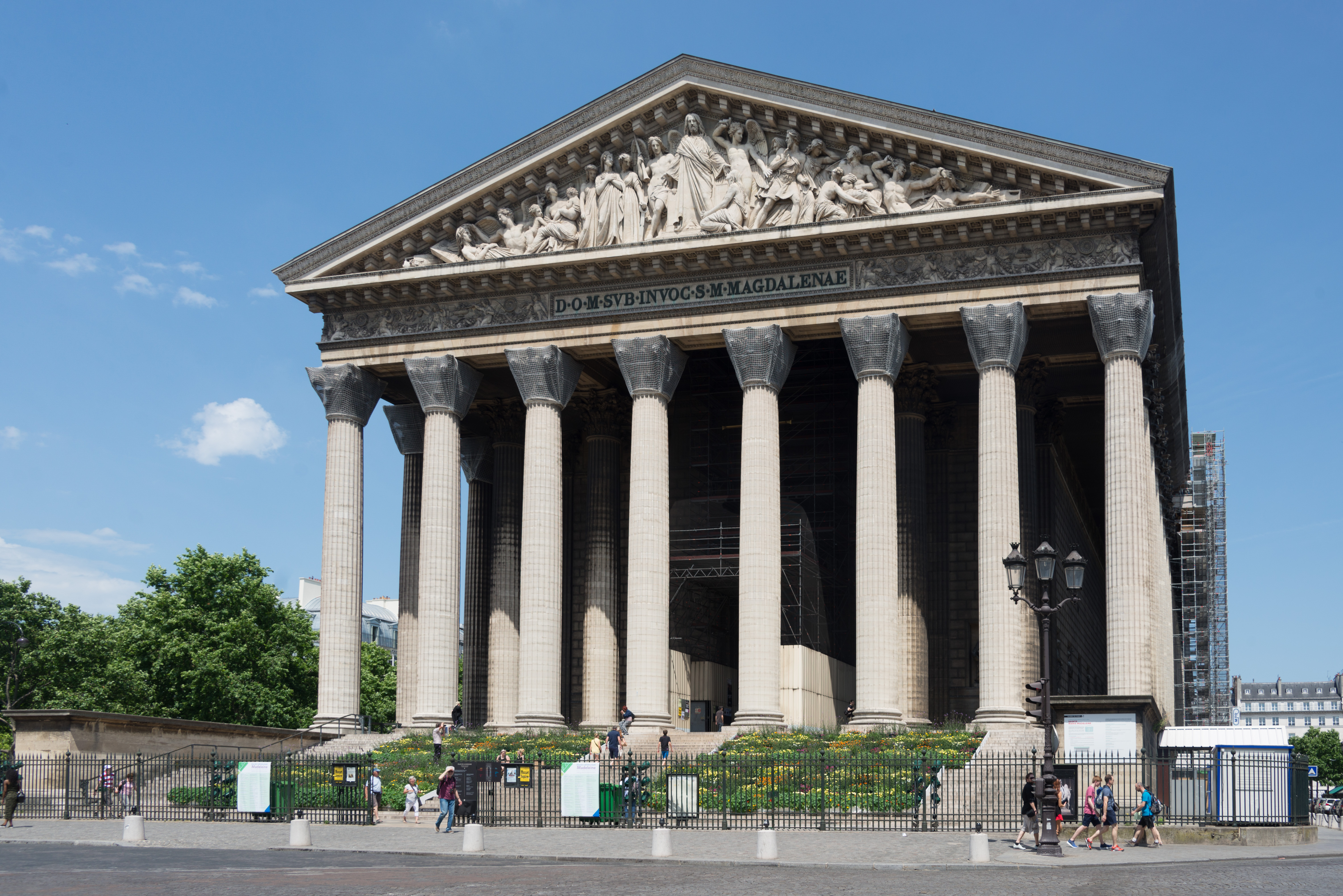 57026-Paris